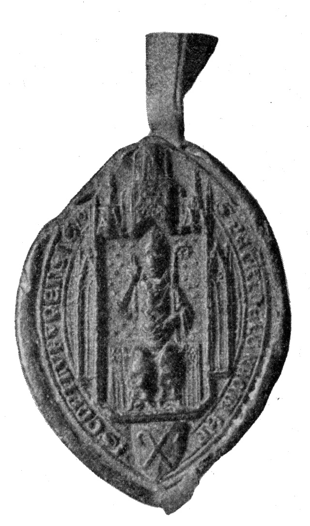 Originalbeschriftung: Abb. III. Siegel des Bischofs Petrus an der Urk. vom 20. Sept. 1370 im Stadtarchiv zu Frankfurt. Umschrift: S. PETRI DEI GRACIA EPISCOPI LUBUCENSIS (Siegel Peters von Gottes Gnaden Lebusischen Bischofs)